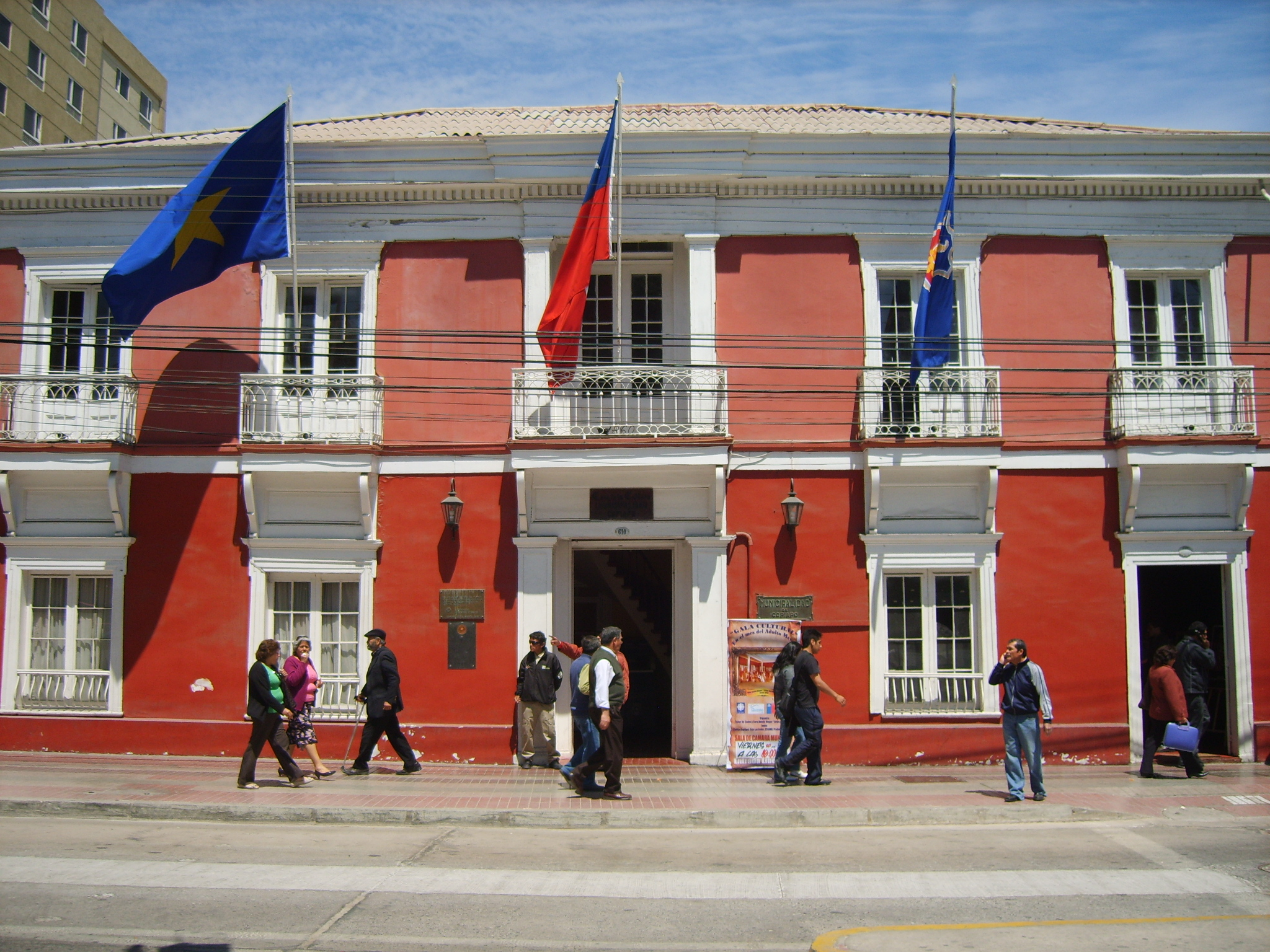 Casa de la Cultura de Copiapó, ex-Casa Paulsen y ex-Municipalidad. Monumento Nacional.